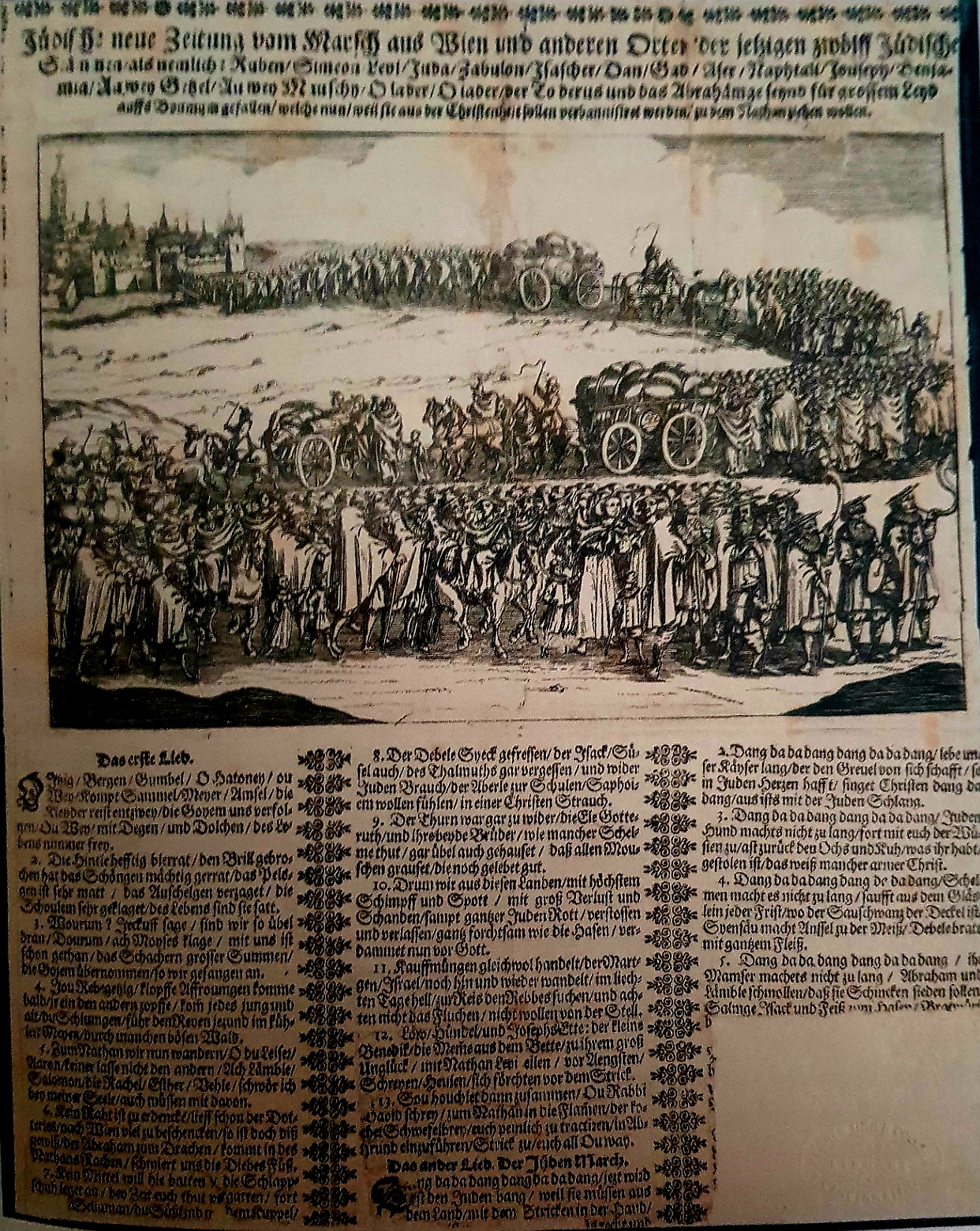 Ein Flugblatt, welches die Vertreibung der Juden aus Wien darstellt, vermutlich um 1670